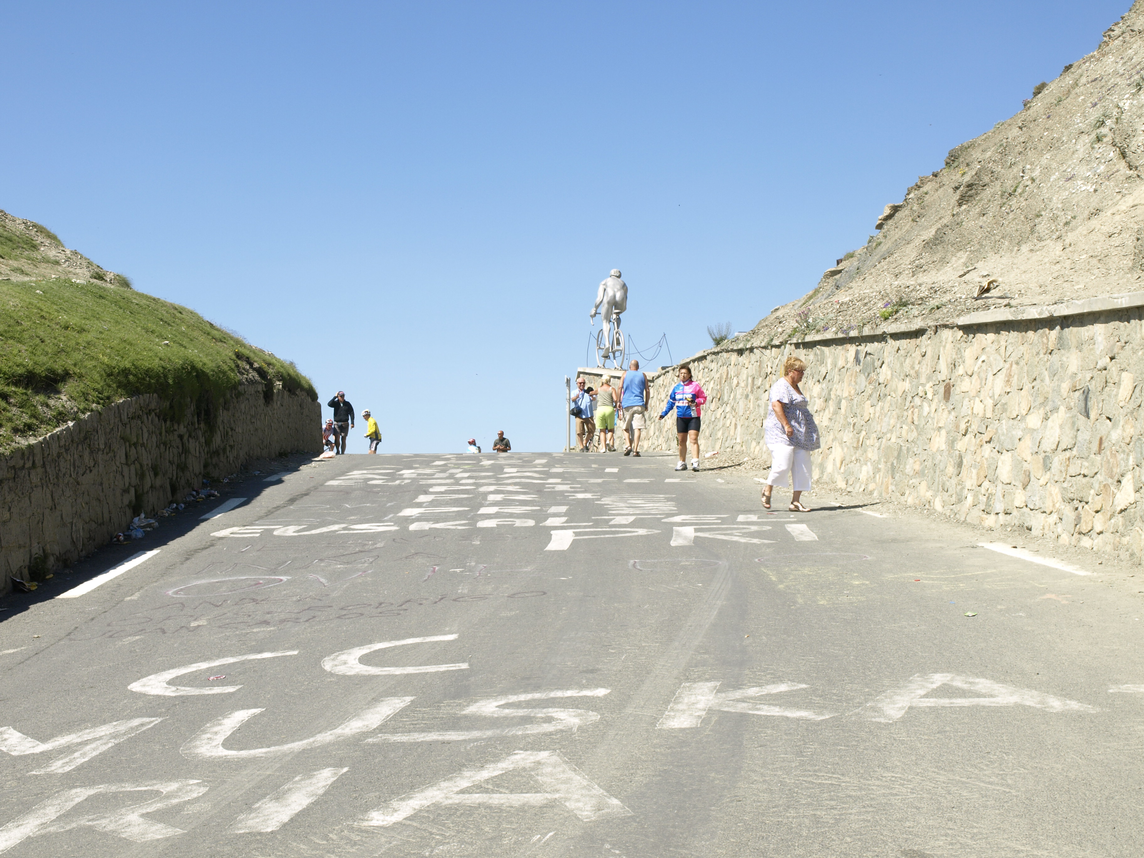 Col du Tourmalet